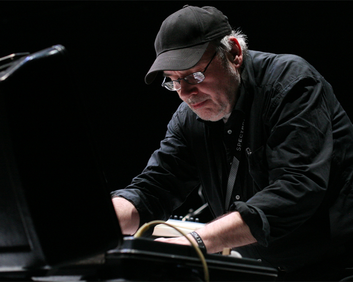 Wolfgang Seidel, Club Tranmediale 2012